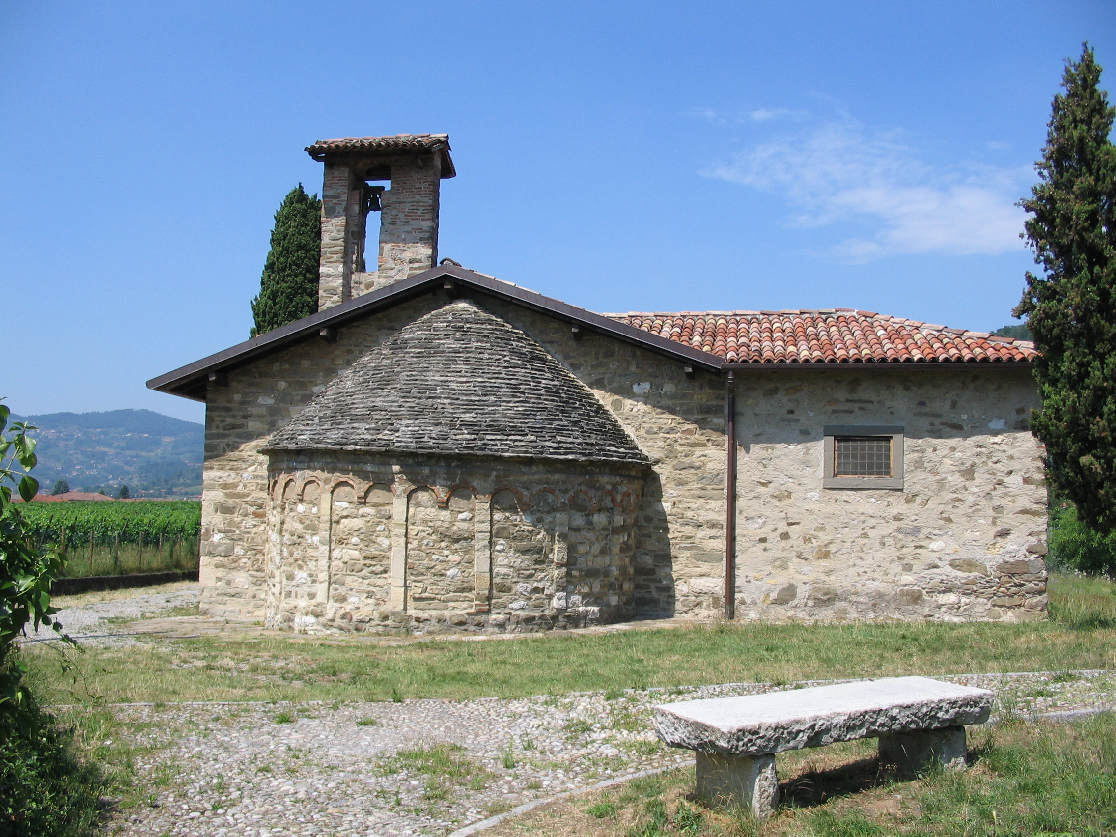 Abisde della Chiesa di Sant'Alessandro ad Agros, sita nel comune di Villongo.